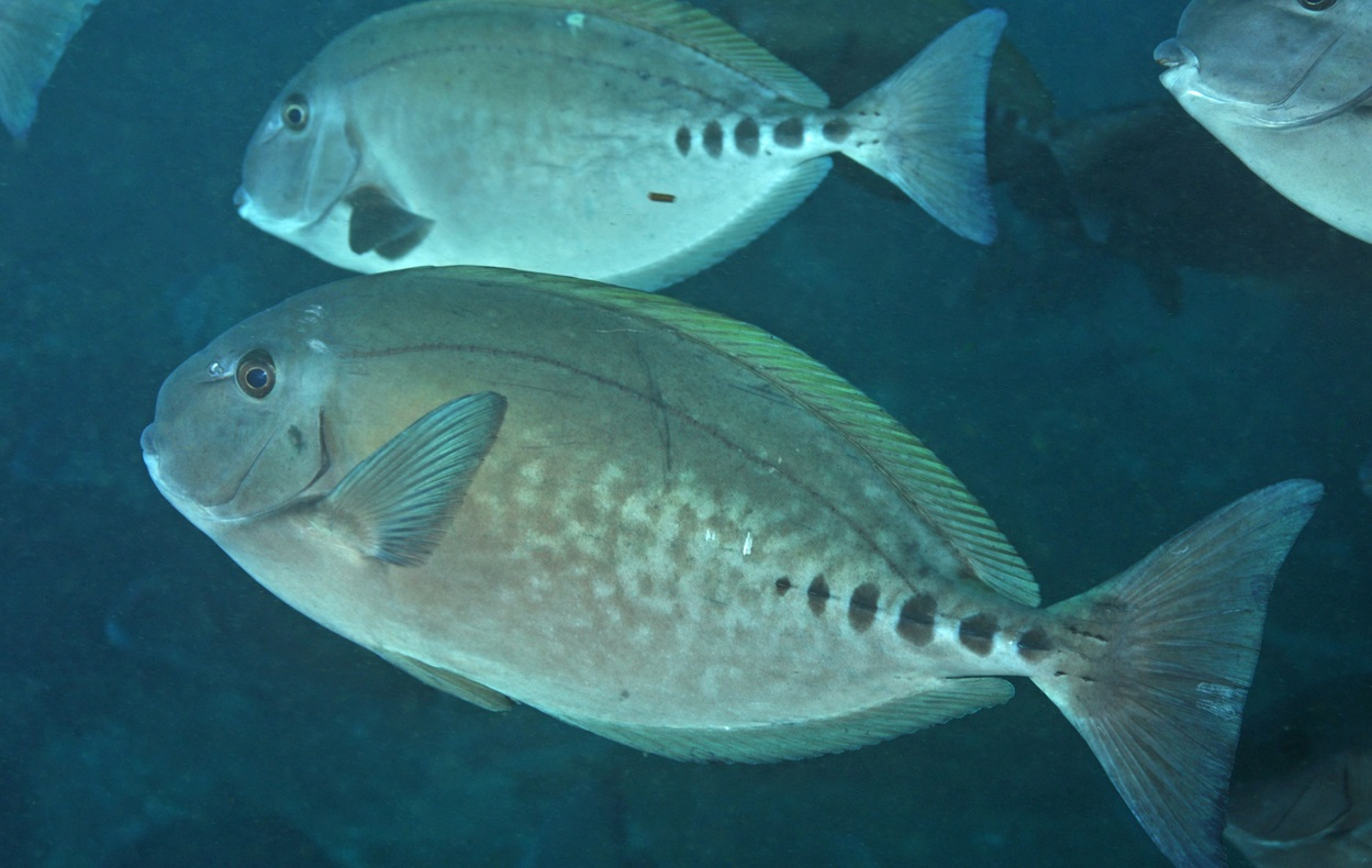 Prionurus microlepidotus en islas Solitarias, Australia